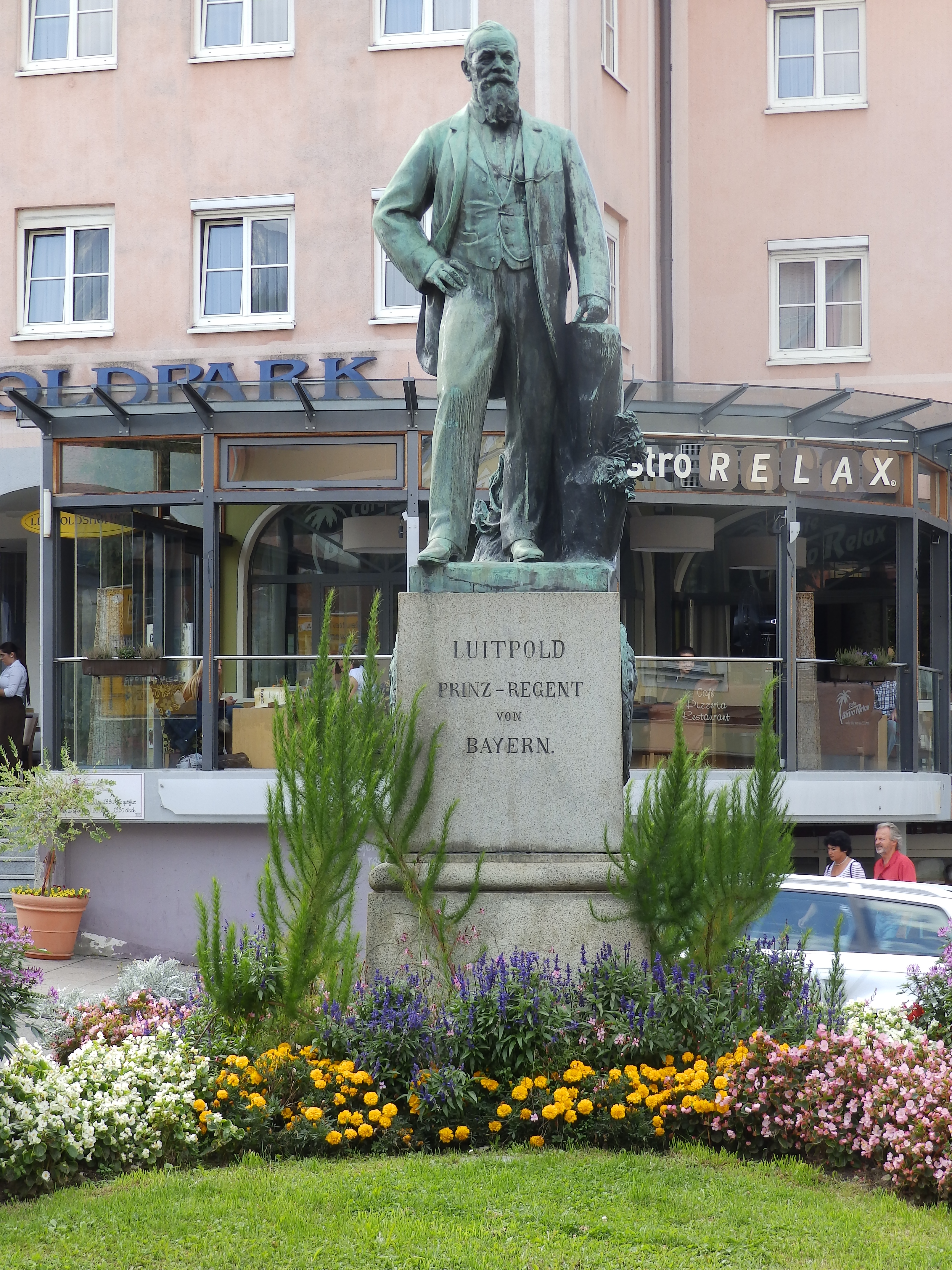 Das Wittelsbacher Denkmal in Füssen; stellt eine Skulptur des Prinzregenten Luitpolds dar.